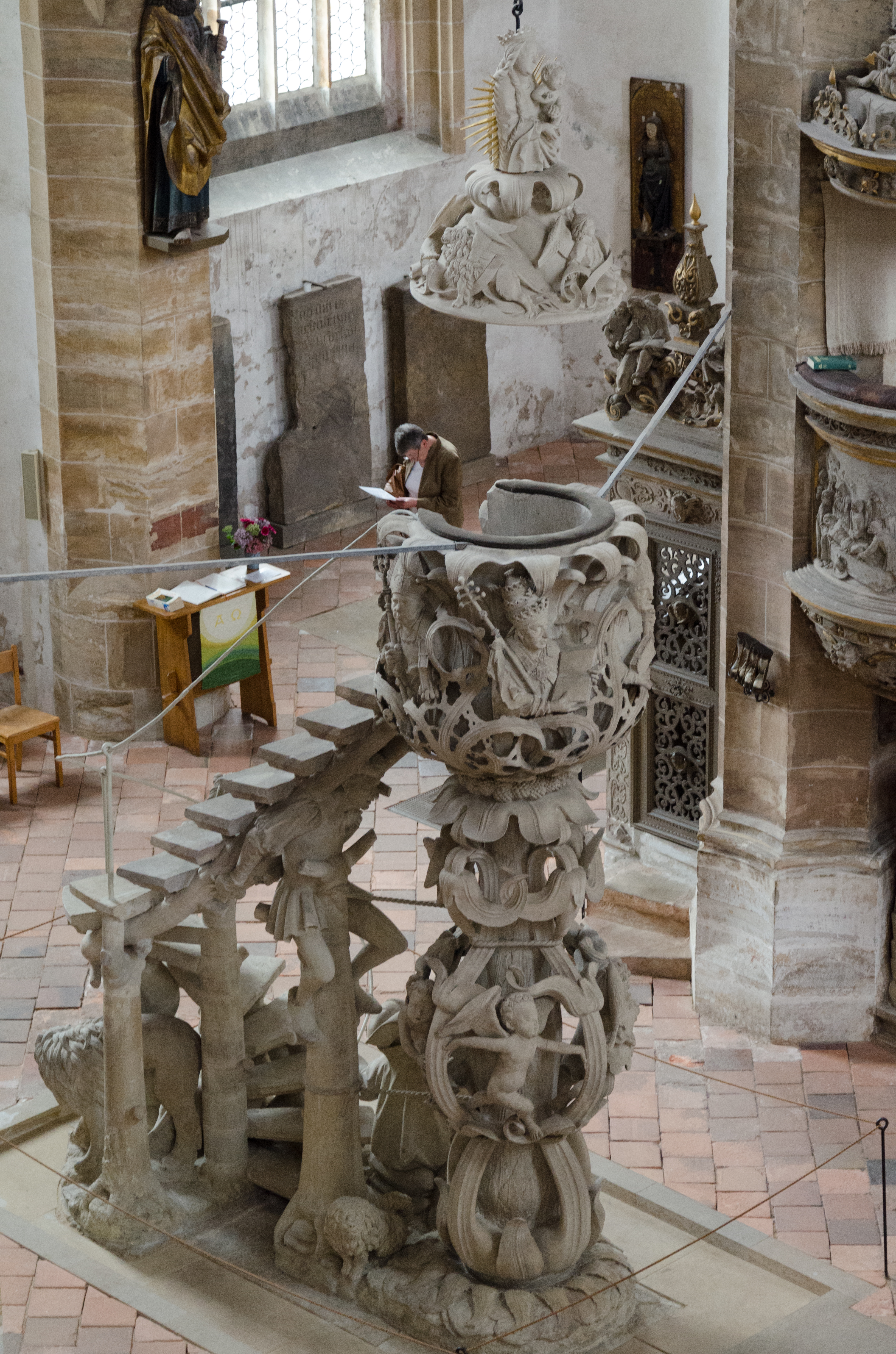 Freiberger Dom. Tulpenkanzel